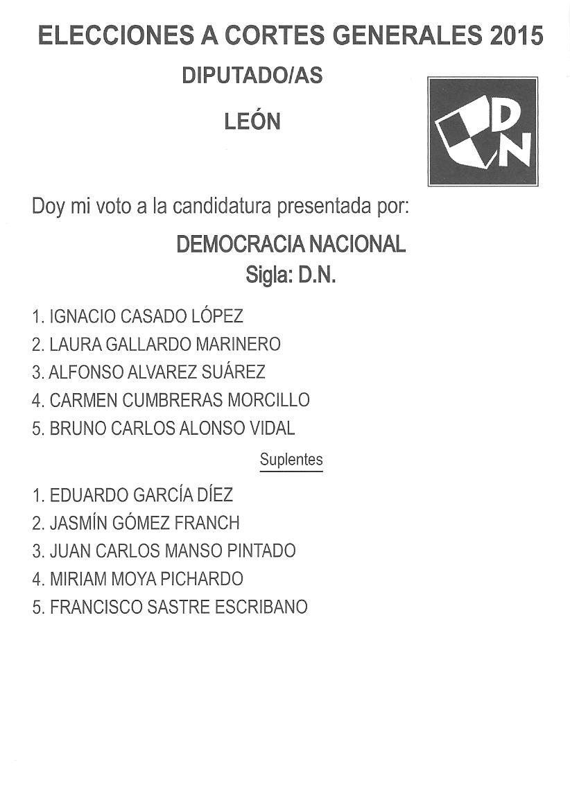 Papeleta del partido Democracia Nacional para las Elecciones Generales de España de 2015 en la circunscripción de León.